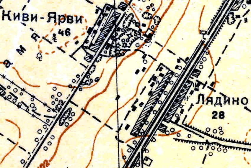 Топографическая карта Ленинградской области, квадрат О-36-13-А-в (Красногвардейск), деревня Лядино